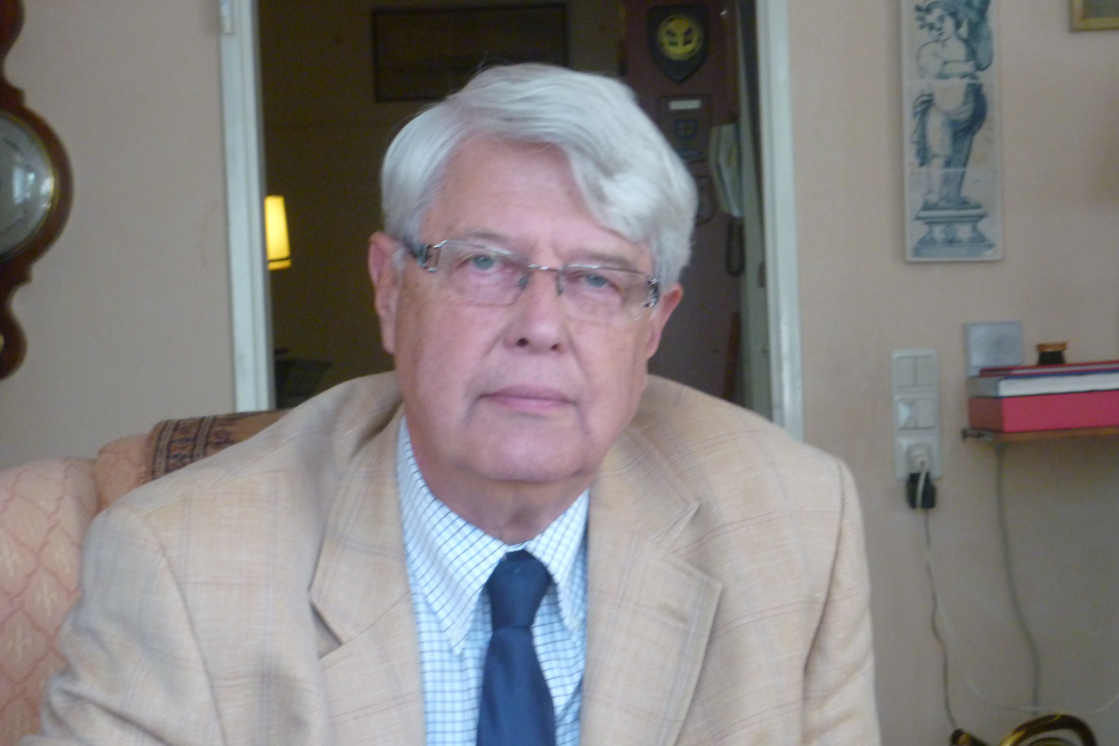 generaal Jan de KLeyn